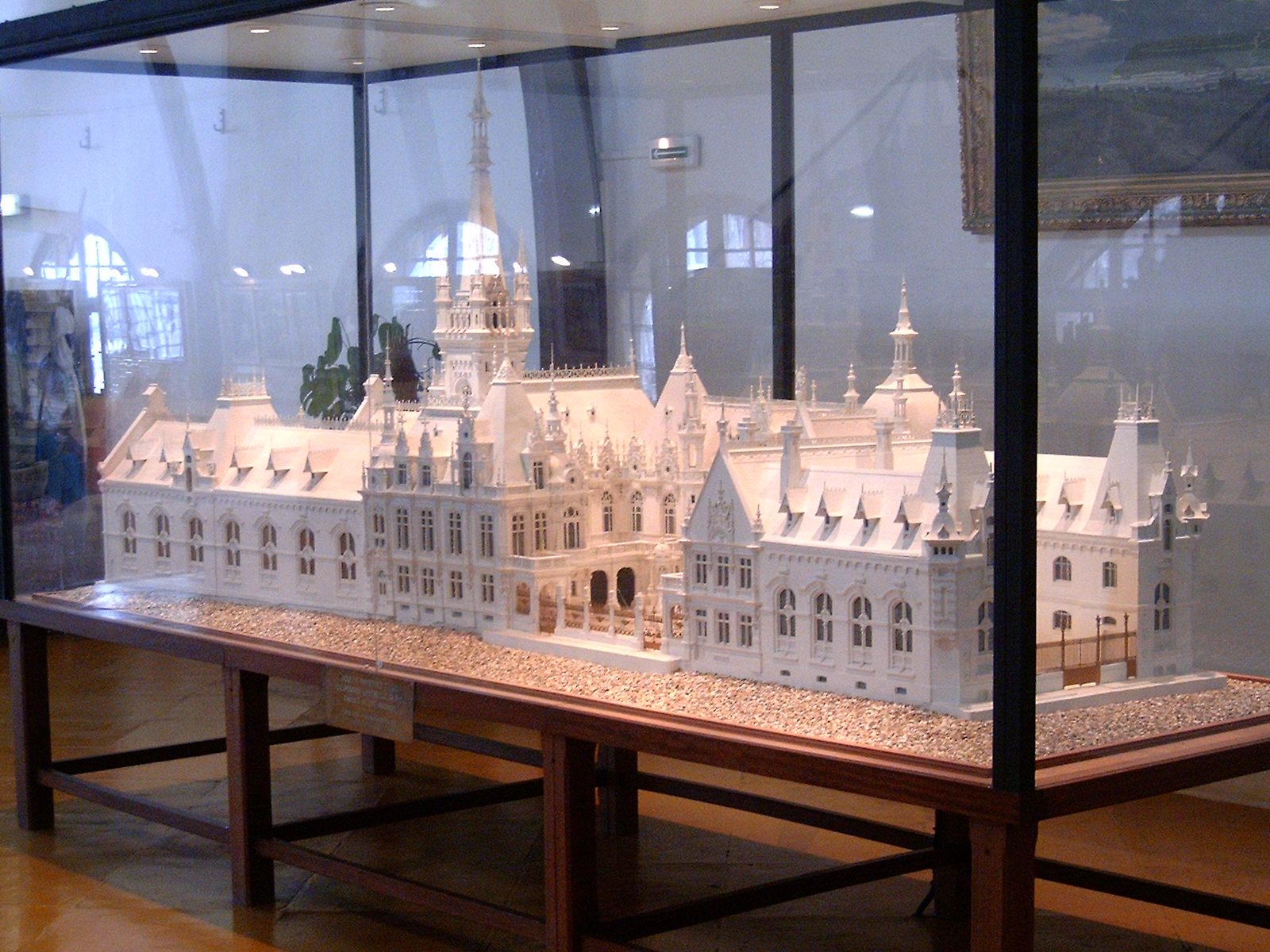 Maquette du Palais Bénédictine, Fécamp (France).